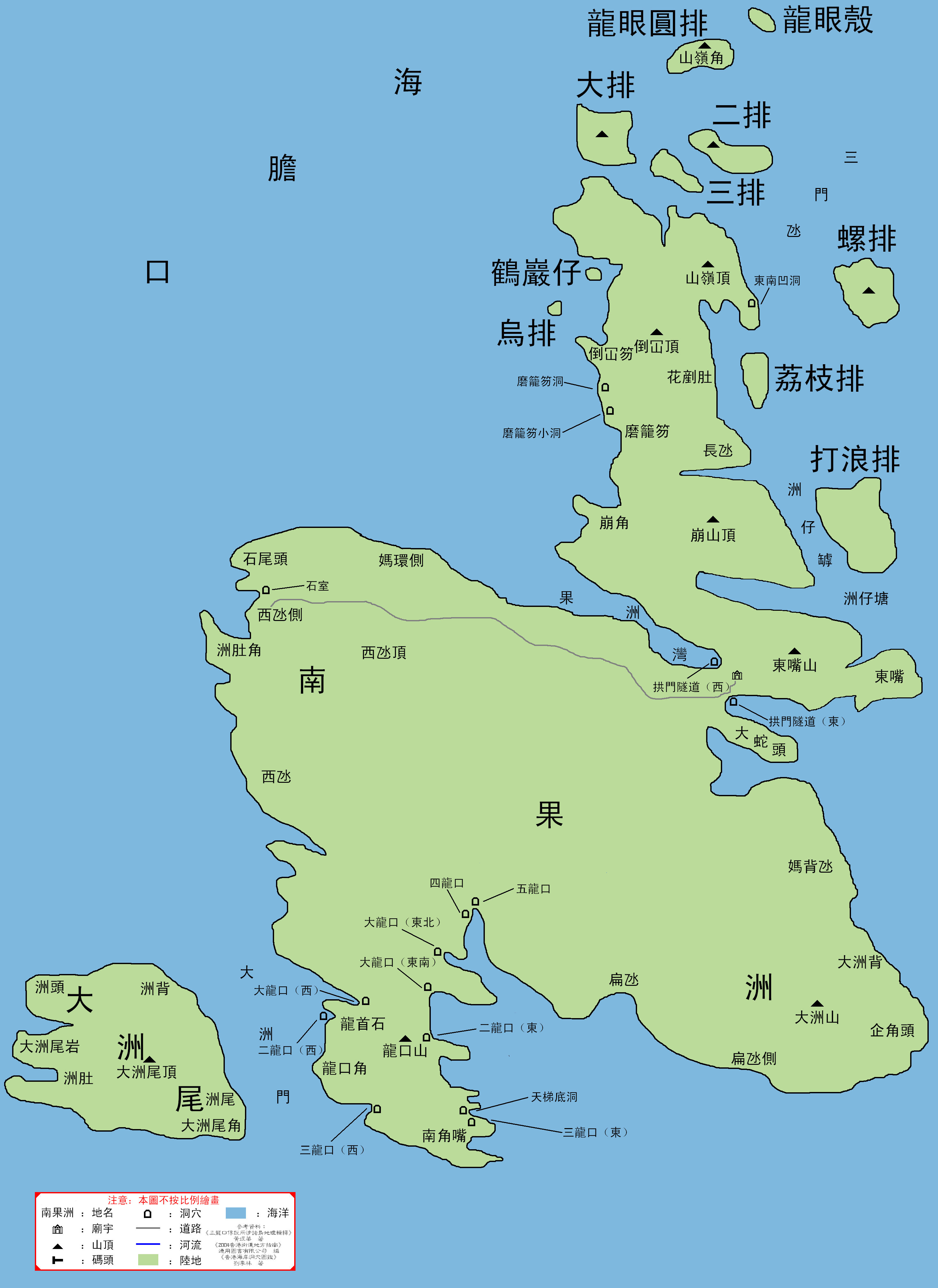 中文（香港）: 南果洲。